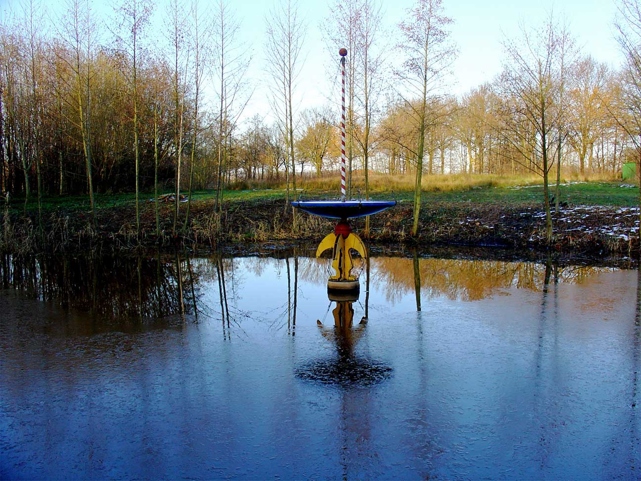 Gurgulio door Trudy van den Berg en Jos Steenmeijer in Onstwedde